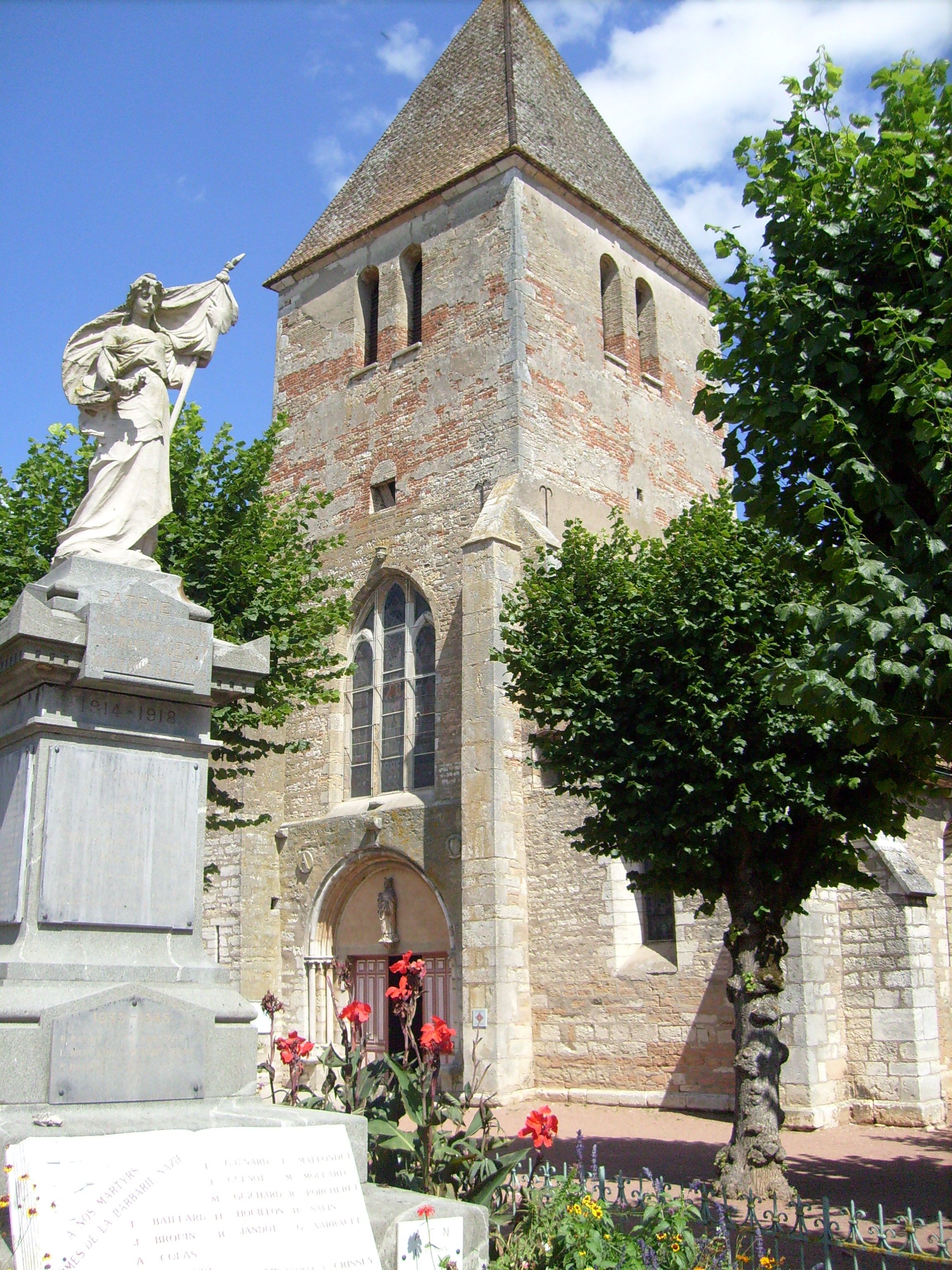 L'église Saint Germain et le monument aux morts à Gergy (71).